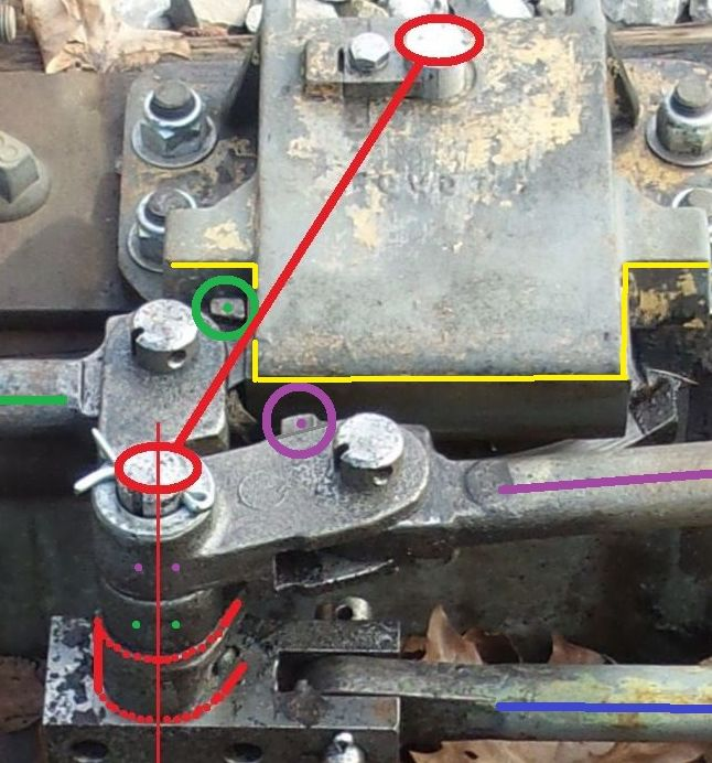 Jüdel-Verschluss mit markierten Einzelteilen der Mechanismen; Ausschnittvergrößerung